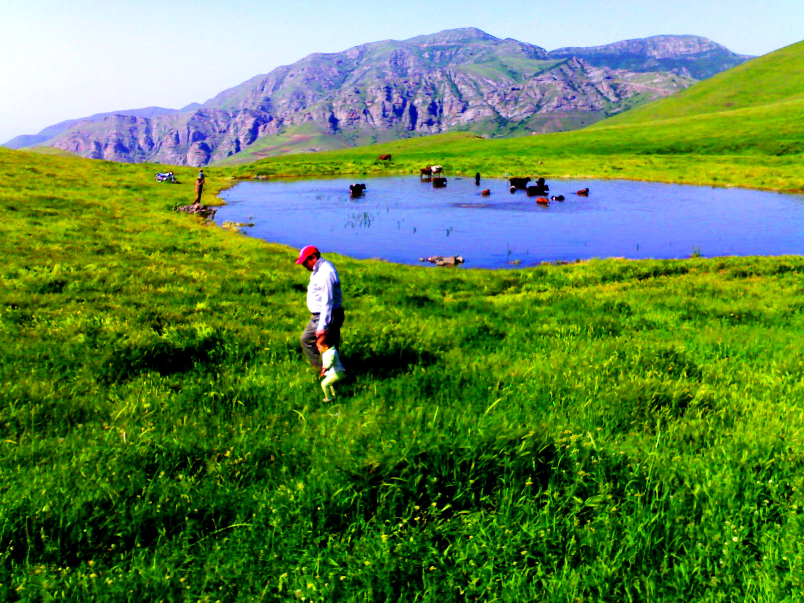 دریاچه قالقانلو-روستای خان کندی